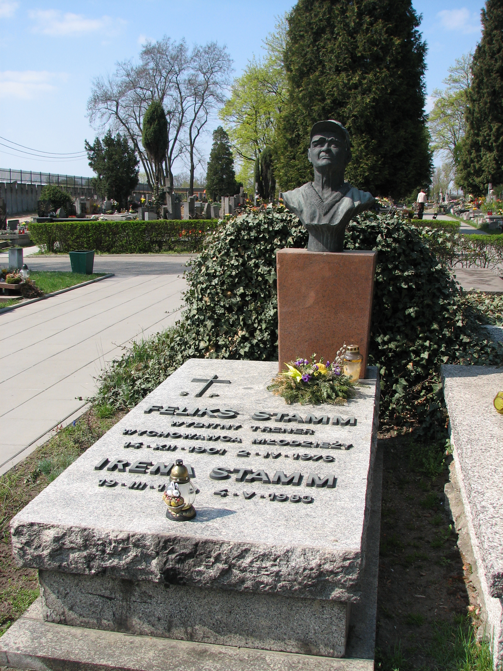 Feliks Stamm's monument (Powązki Cemetery; Cmentarz Komunalny, d. Wojskowy)